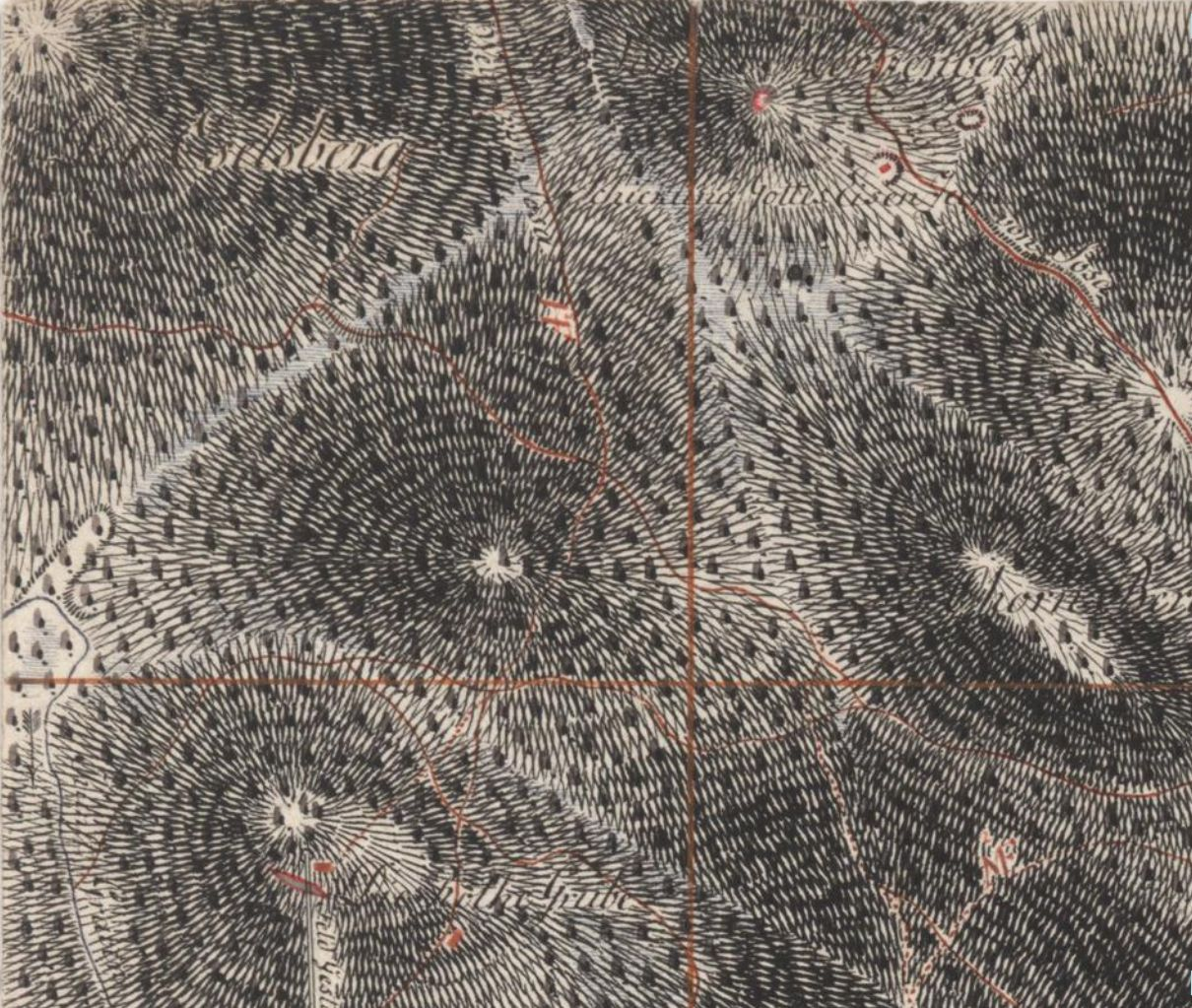 Rote Grube im Erzgebirge (unten) bei Sosa: In Blatt 248 der Sächsischen Meilenblätter von Friedrich Ludwig Aster im Berliner Exemplar aus dem Jahr 1791 im Entwicklungsstand Ende des 18. Jahrhunderts. (Link zum Kartenblatt in der Staats- und Universitätsbibliothek Dresden) .Der Ausschnitt zeigt auch den Eselsberg (867 m), verschiedene Wege mit der Bezeichnung „Weg von Sosa“ (einer davon heißt heute Rotgruberweg), die „Schickung Gottes Eisen Zeche“, Vorderer Marzenberg (805 m), „Der Ahornberg“. Der Fällberg (843 m) ist rechts am Rand dargestellt, die Bezeichnung in diesem Ausschnitt aber nicht zu sehen. Die Karte ist nicht genordet, sondern die Oberkante ist Nordwesten.